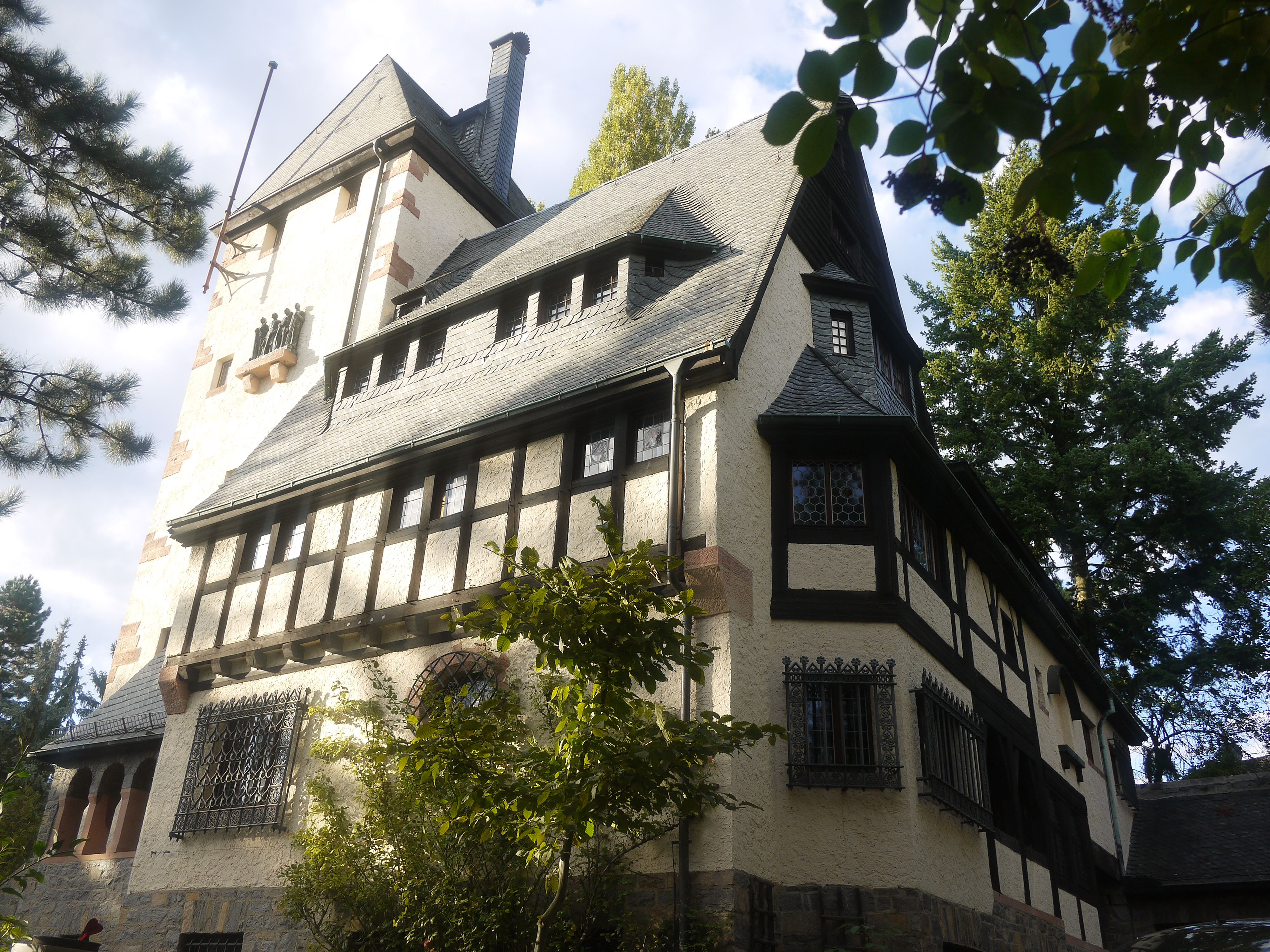 "Gentilburg", Würzburger Straße 165, denkmalgeschützte Villa in Aschaffenburg